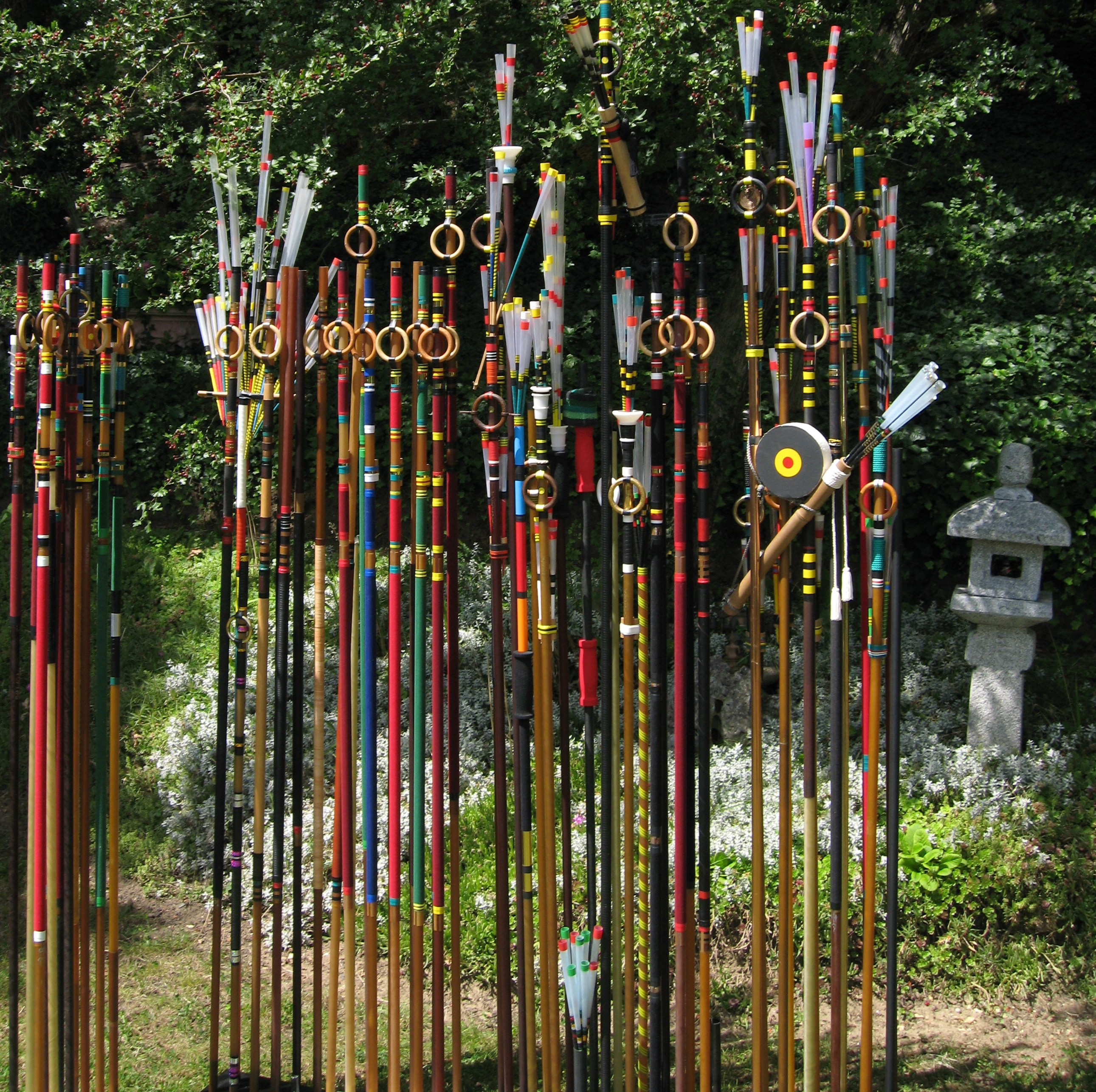 Les sarbacanes-Sarbacana (au Zen-Dojo de Chanteloup, France.)